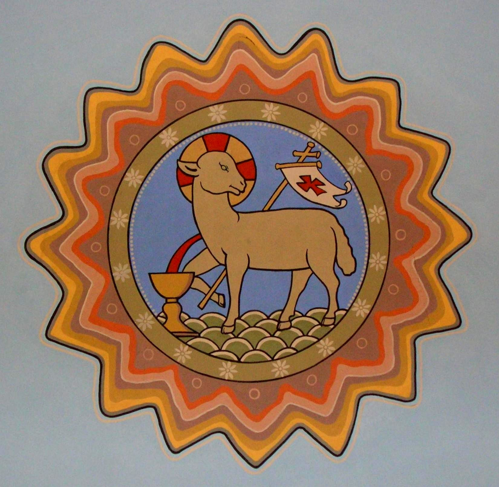 St. Josef Church Sehnde-Bolzum (Germany): Agnus Dei in the apse